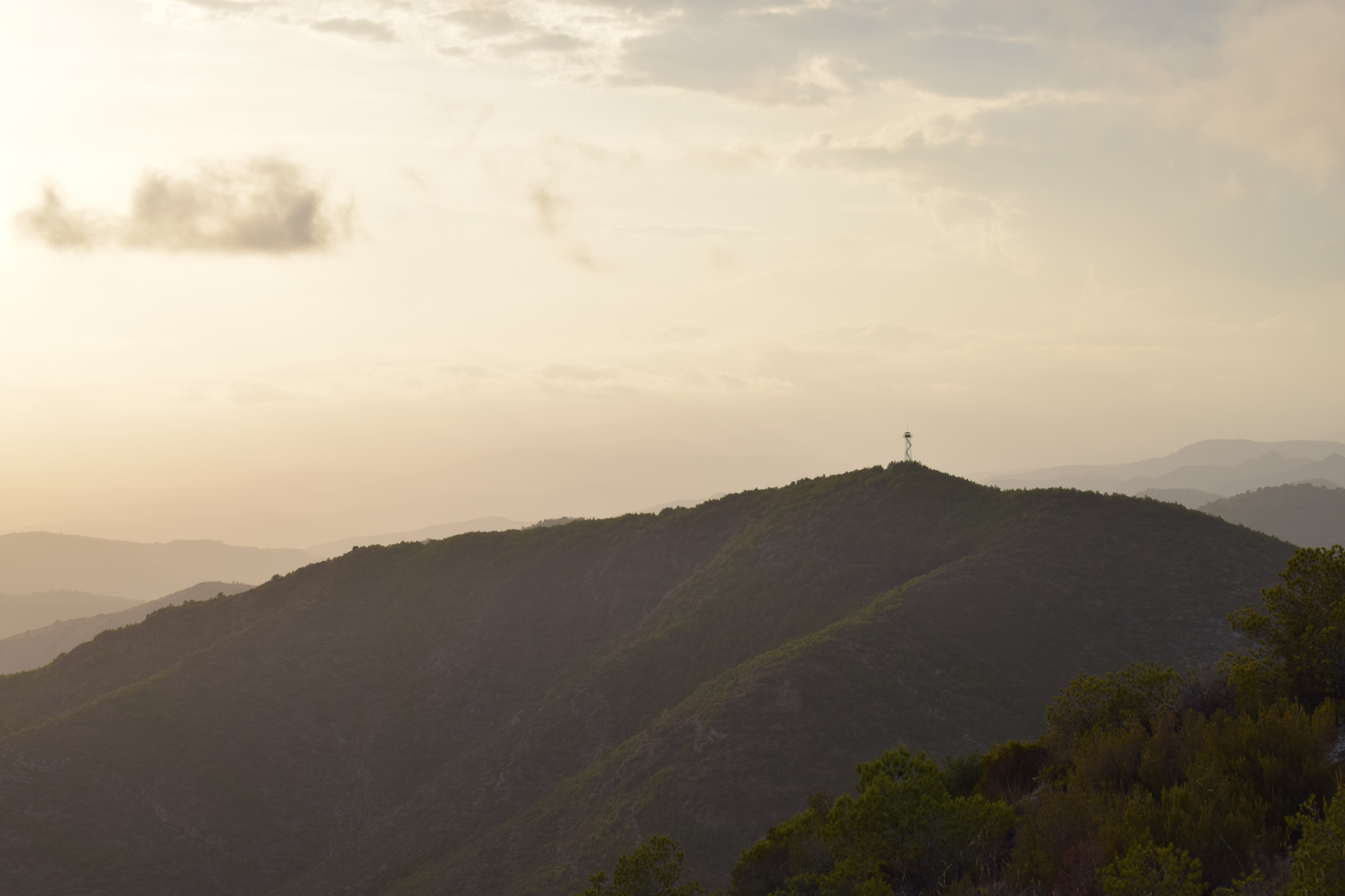 Vista desde el mirador de Rebalsadors - Serra